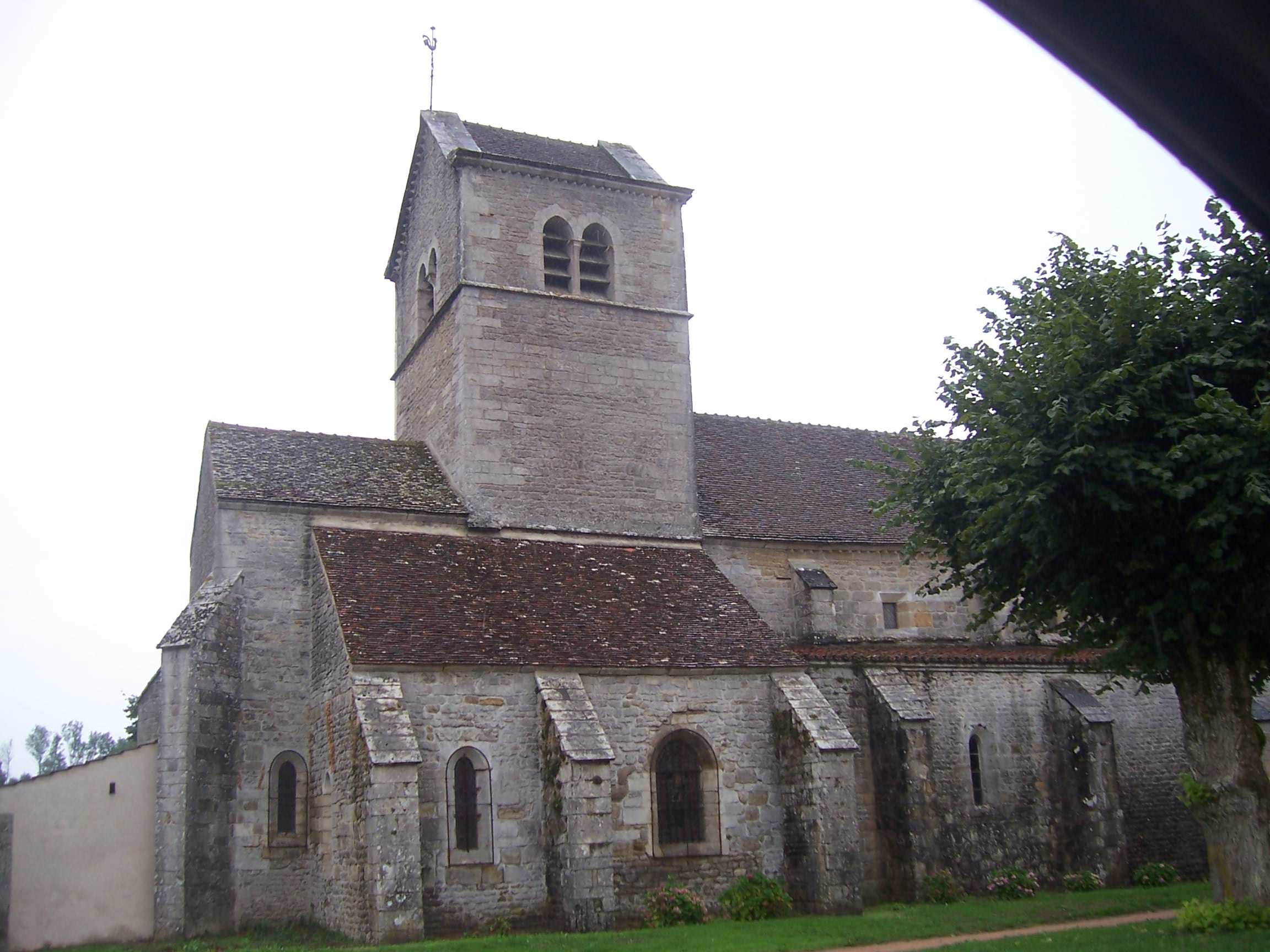 Eglise de Saint-Gervais-sur-Couches